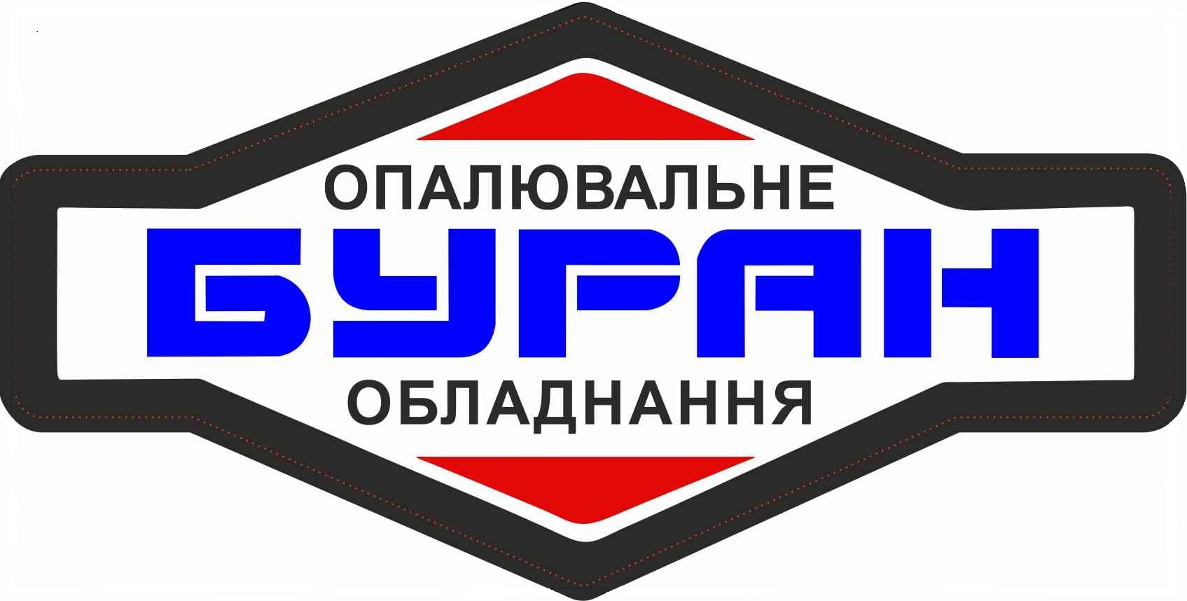 Наша рідна емблема